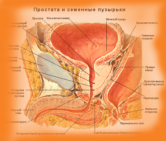 Семенные пузырьки и простата